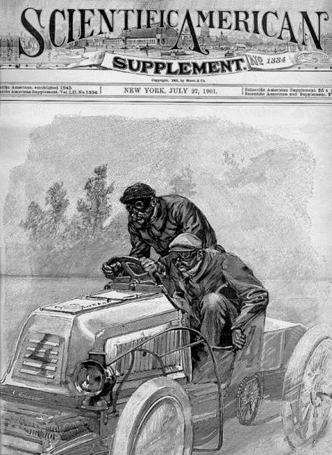 Henri Fournier en course au Paris-Berlin 1901 (supplément technique)